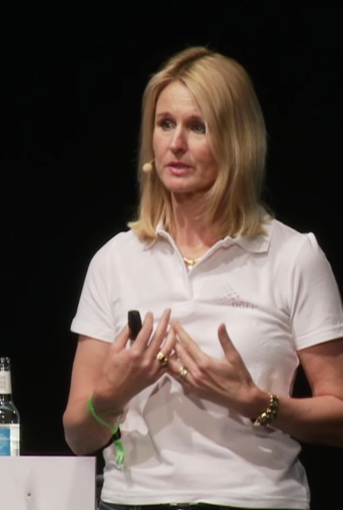 Personalvorstand und Arbeitsdirektorin Continental AG